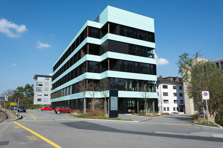 Hauptsitz der VZ Depotbank in Zug